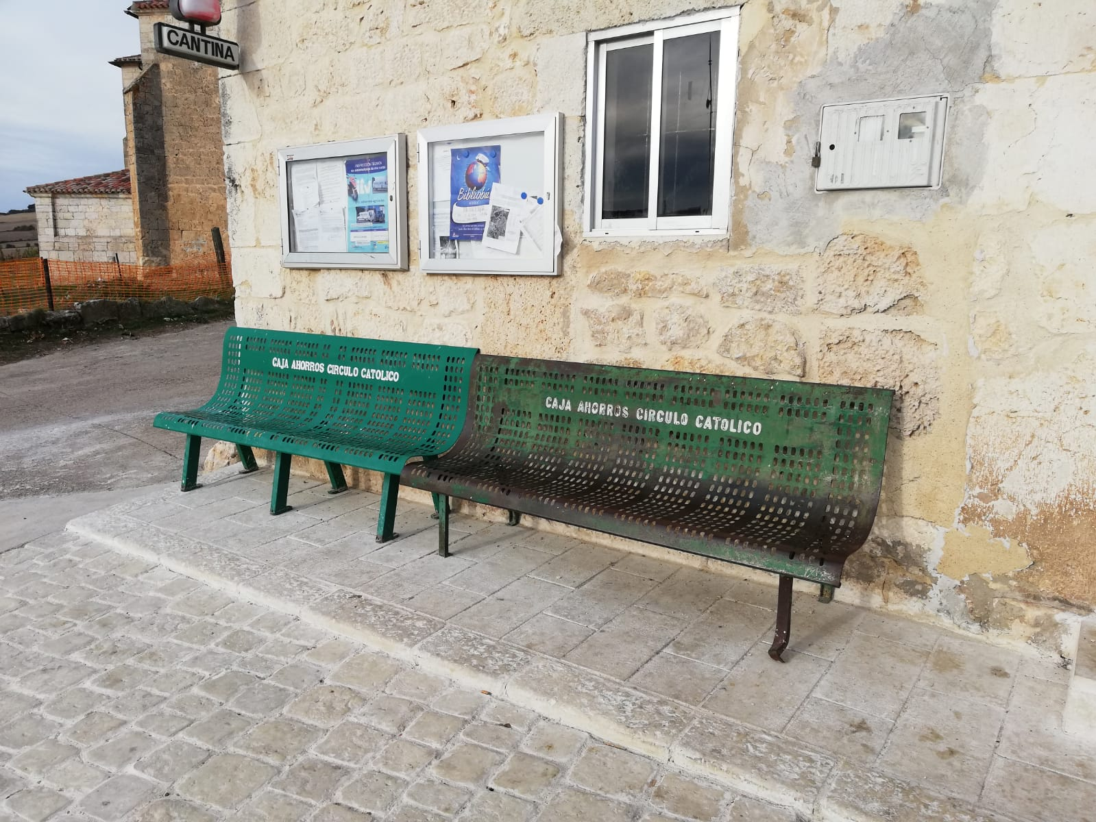 Bancos con la inscripción "Caja Ahorros Círculo Católico" en Santa Olalla de Bureba, Burgos.